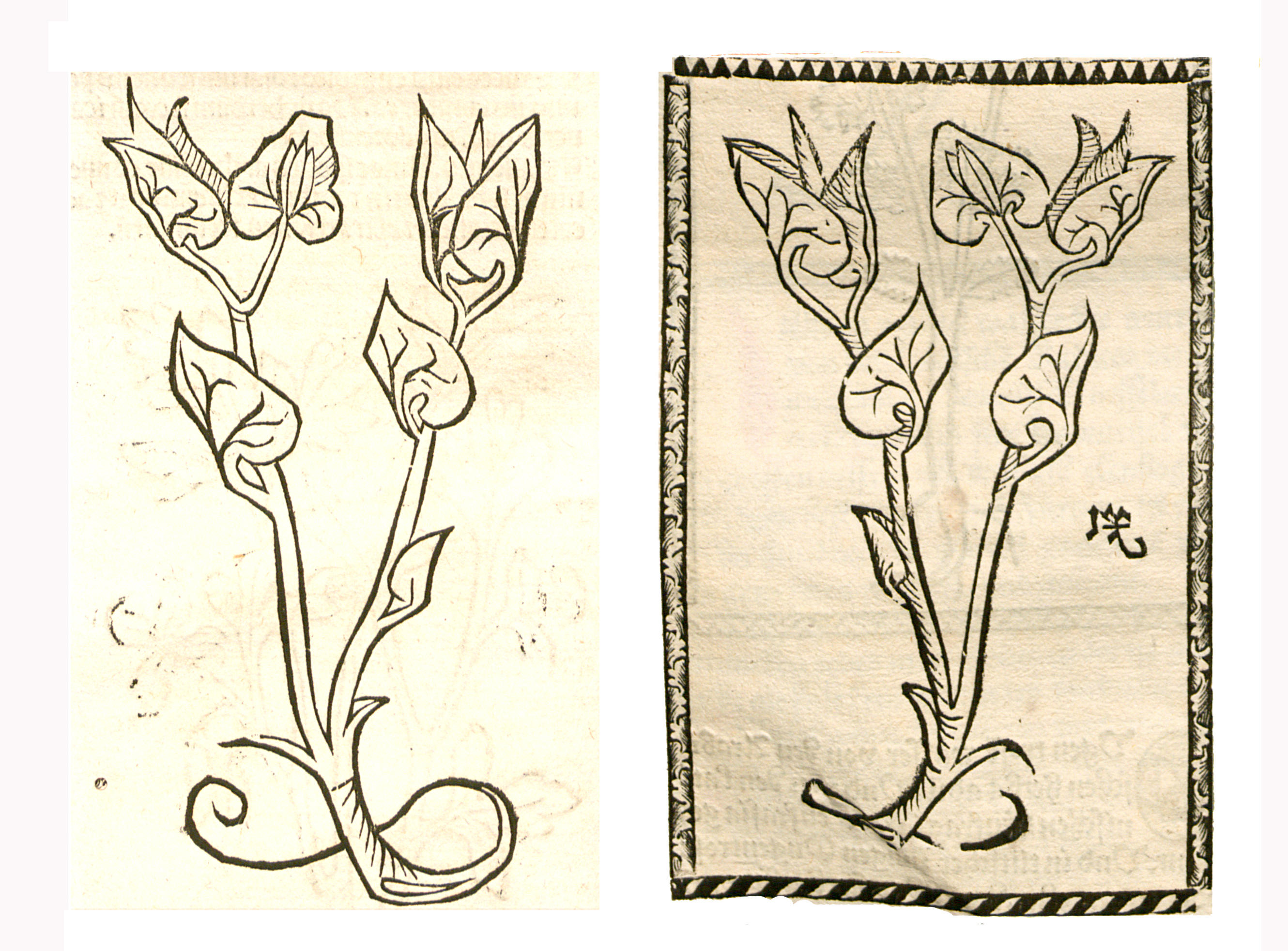 Abbildung von Osterlucien = Aristolochia clematitis